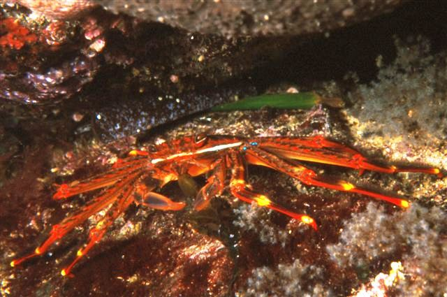 Area Marina Protetta Capo Gallo, Palermo, Sicily Percnon gibbesi